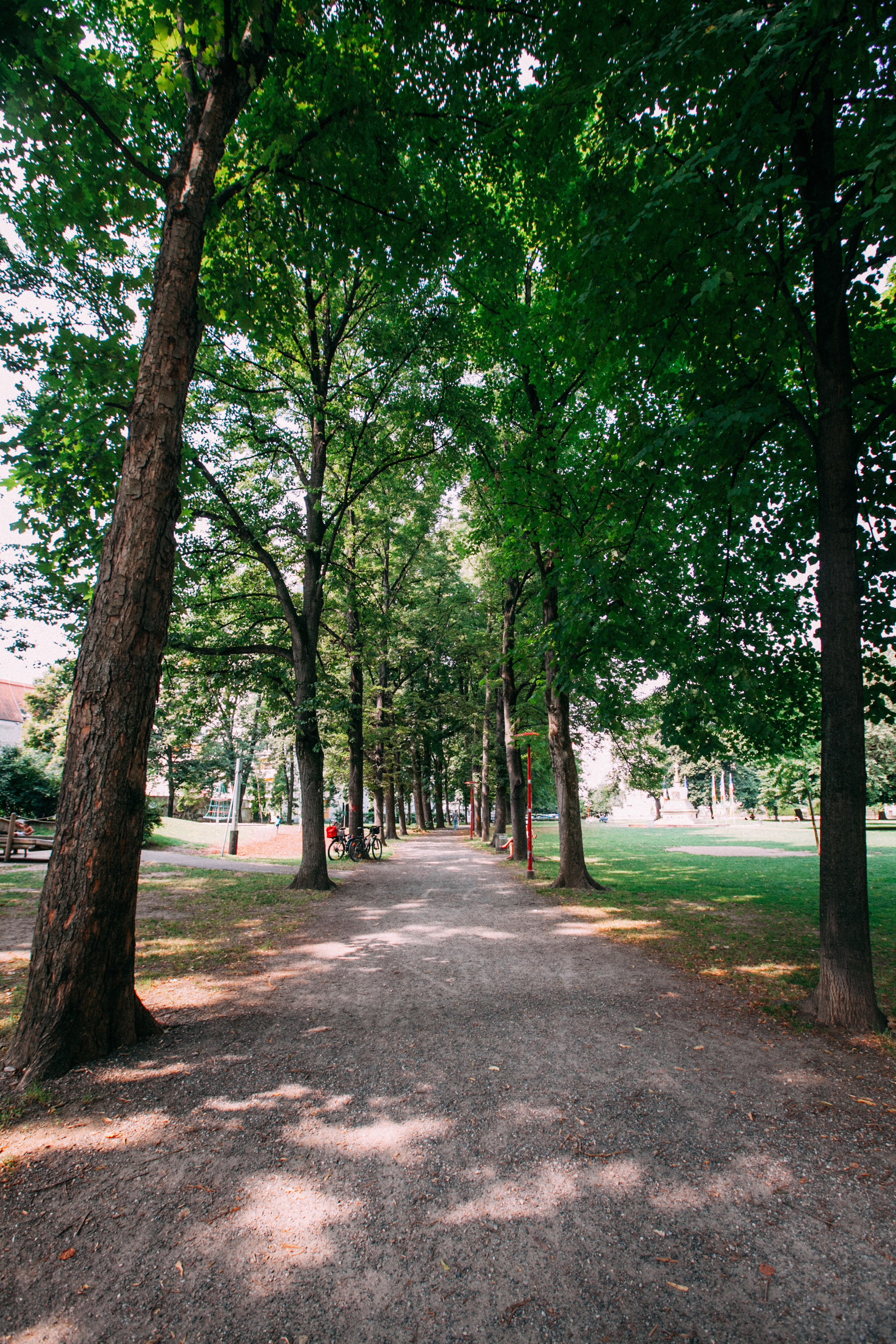 Baumallee im Volksgarten Graz